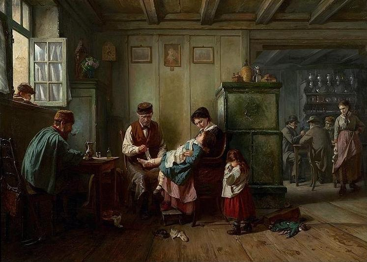 Der Gelegenheitsdoktor, 1886. Öl auf Leinwand, 85 x 120 cm